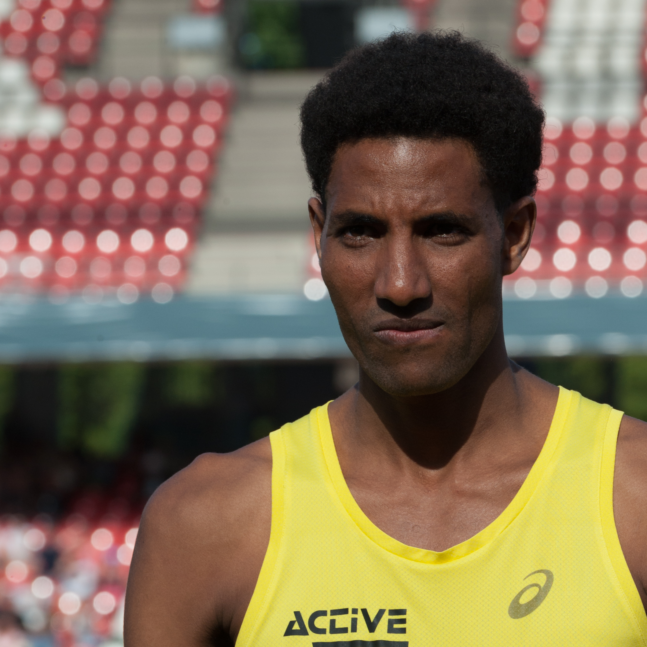 Deutsche Leichtathletik-Meisterschaften 2015: Männer 5000m - Amanal Petros, TSVE 1890 Bielefeld